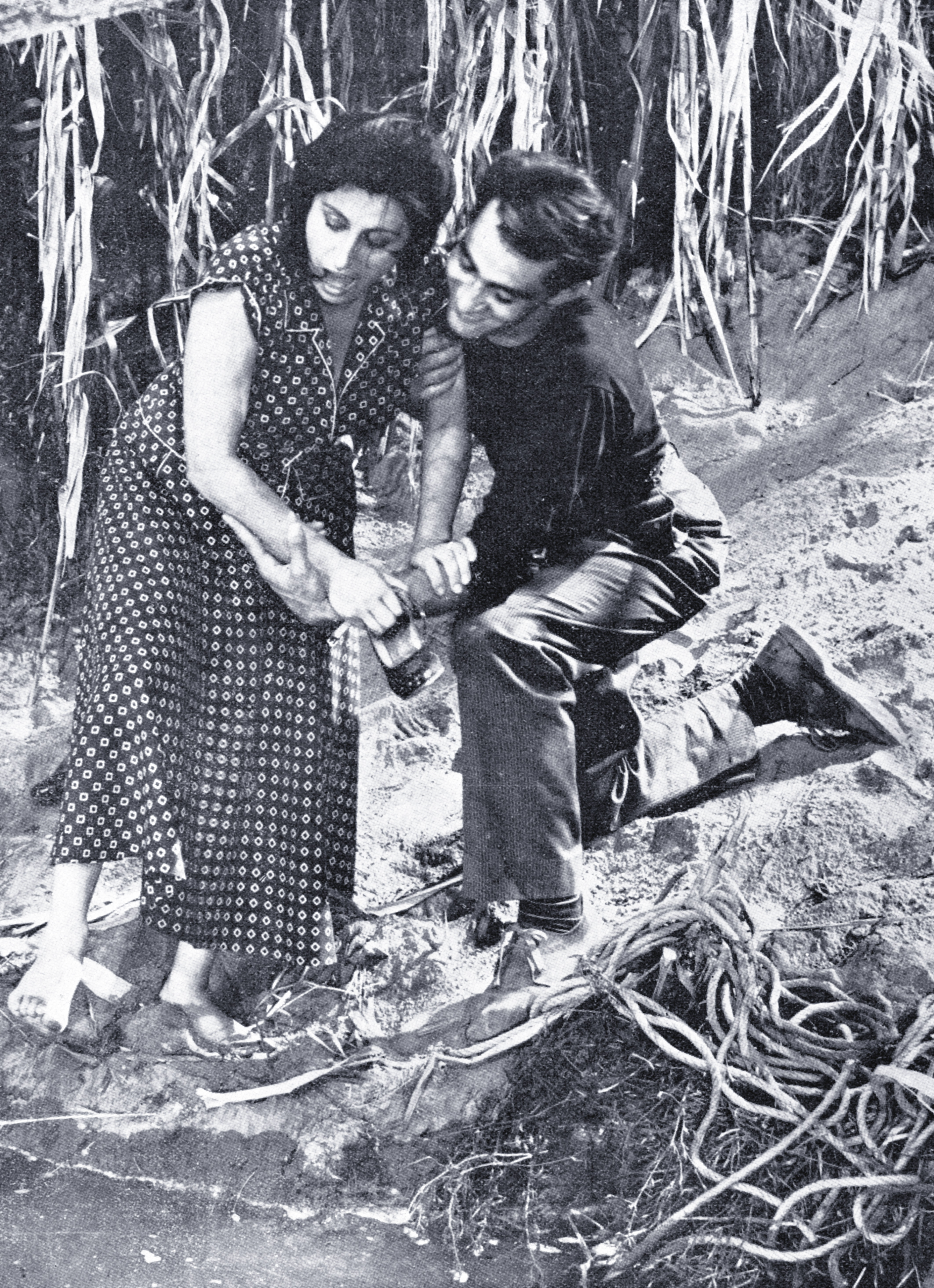 Anna Magnani e Walter Chiari nella scena di "Bellissima" (Visconti, 1951) ambientata in riva al fiume.